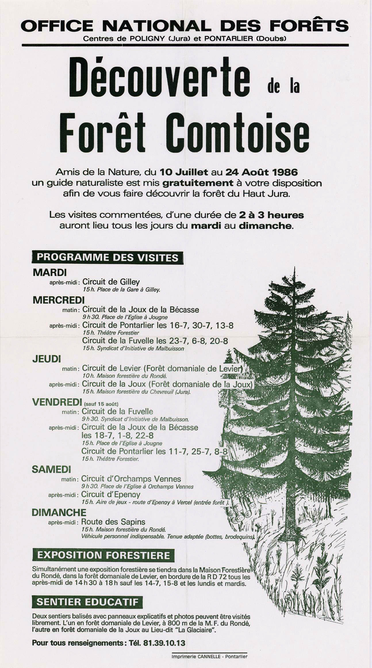 Affiche de l'Office national des forêts pour promouvoir les visites guidées en forêt, 1988.